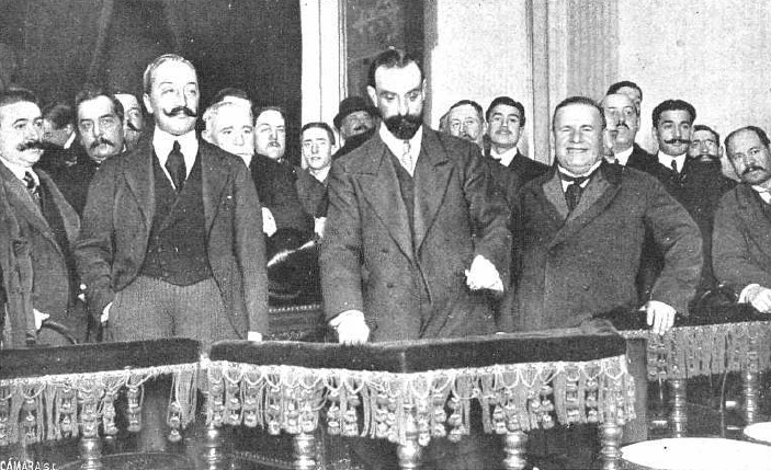 Fotografía del político español de la Liga Regionalista Francisco Cambó (en el centro, con barba) durante una conferencia que pronunció en el Círculo de la Unión Mercantil de Madrid en 1912. A su izquierda está Emilio Zurano, presidente del Círculo. A su derecha, Carlos Prast, presidente de la Cámara de Comercio.